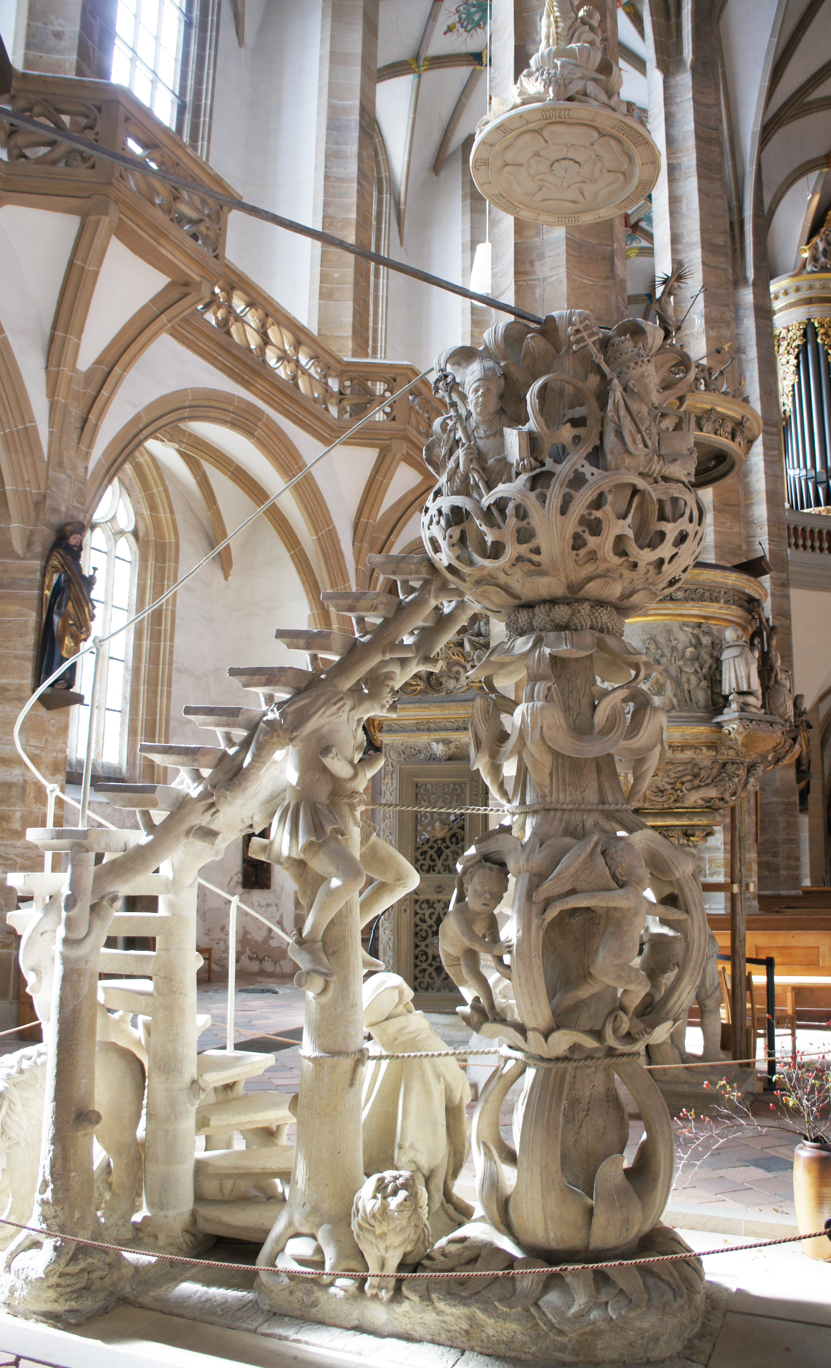 Der Dom zu Freiberg; - Google Maps - Google Earth